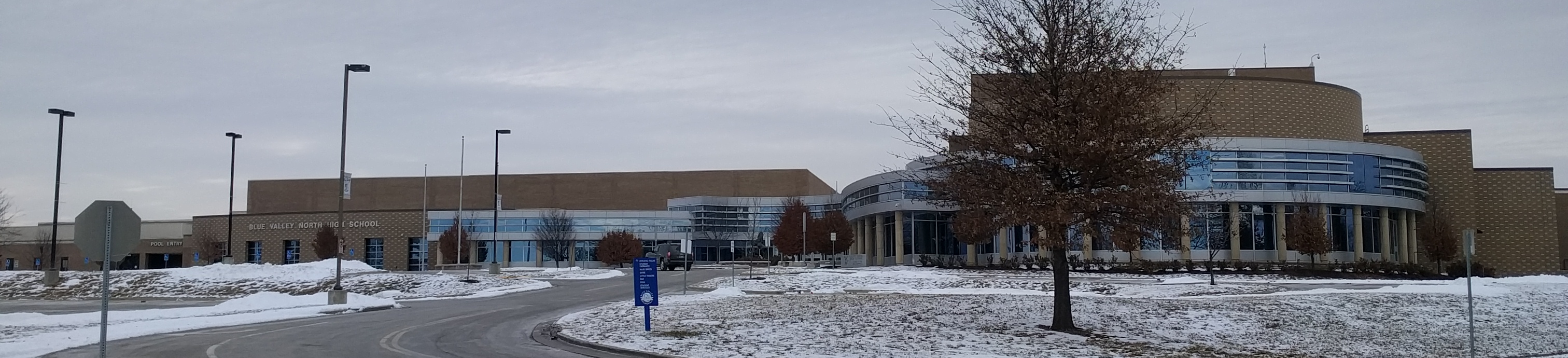 Taken from 123rd Street